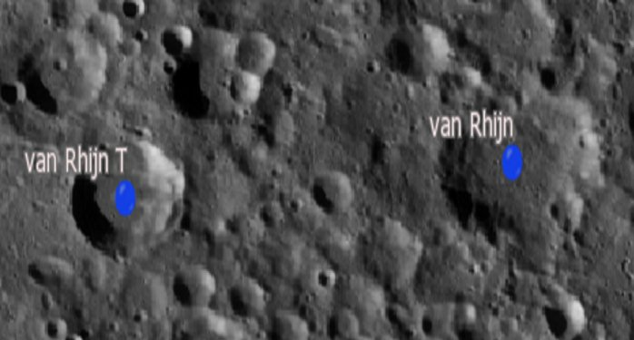 Cráter lunar Van Rhijn. Cráteres satélite. (Imagen LRO)